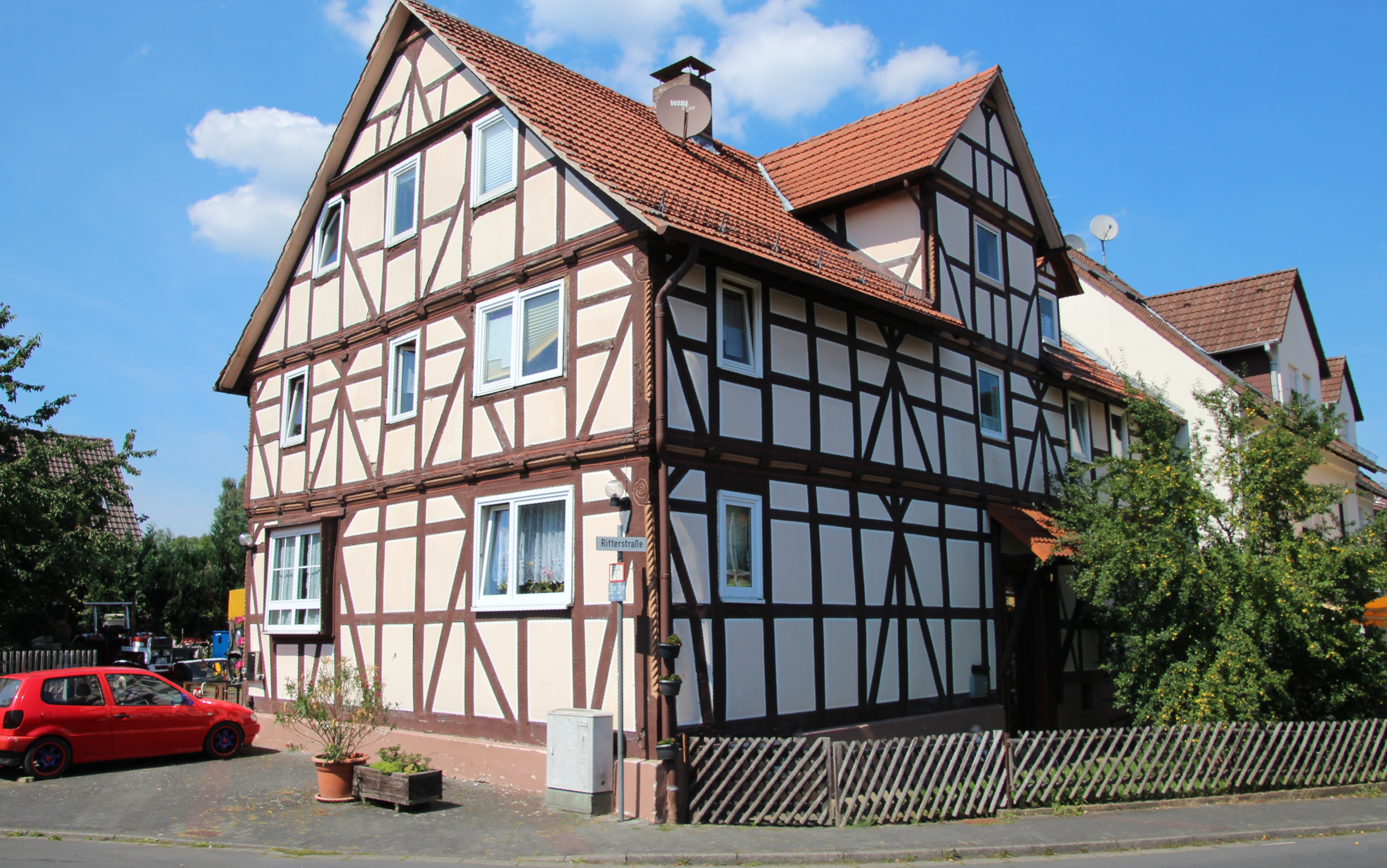 Eckgebäude Ritterstraße 14 in Baunatal